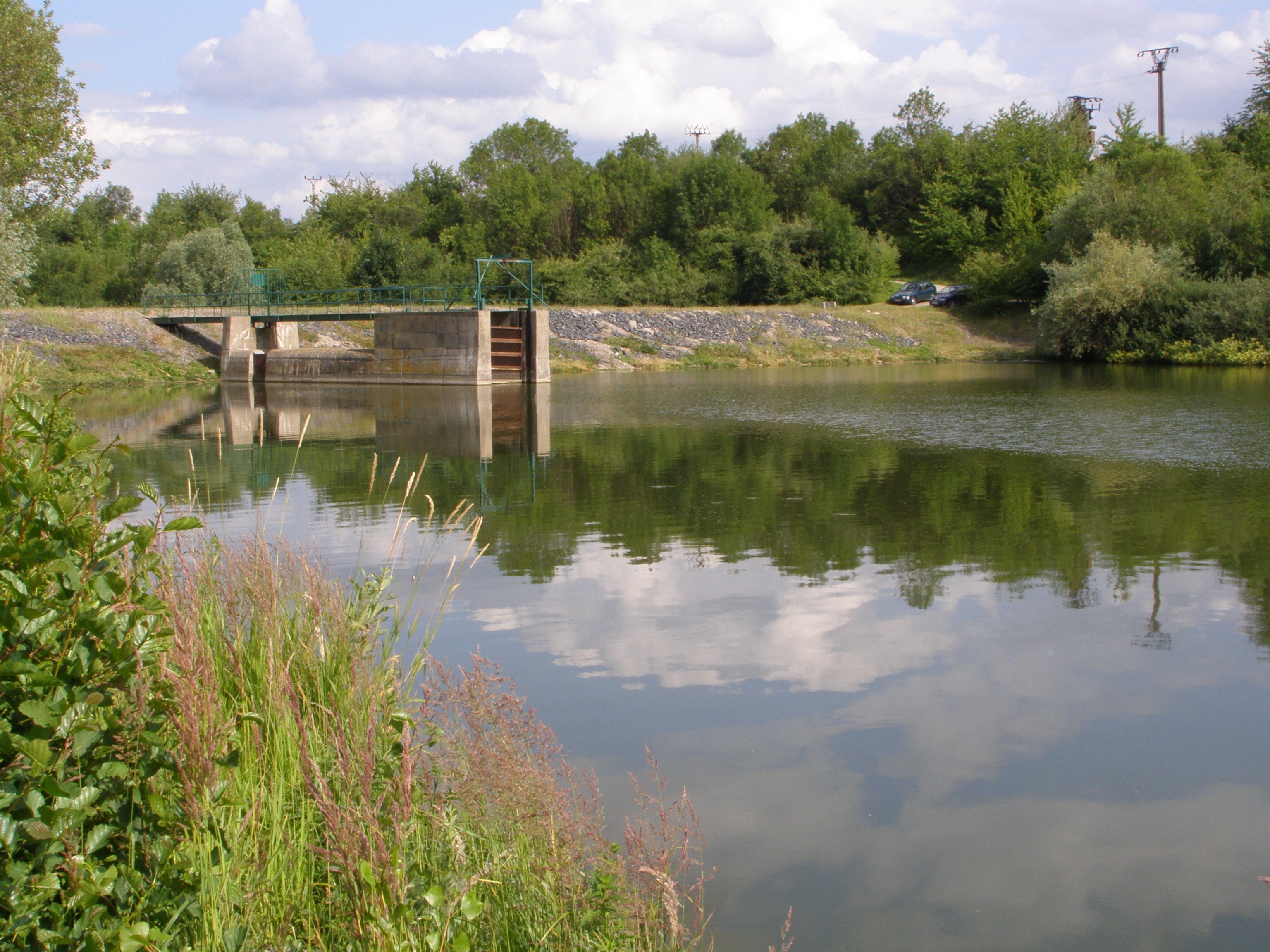 Česky: Kutná Hora, část Neškaredice, rybník Neškaredice, hráz